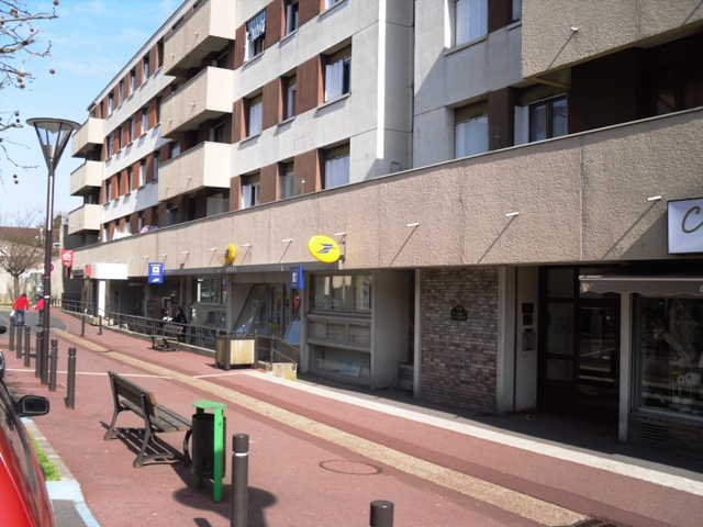 L'agence postale de Chilly-Mazarin (91)